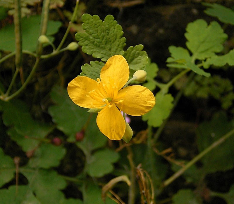 Chelidonium majus